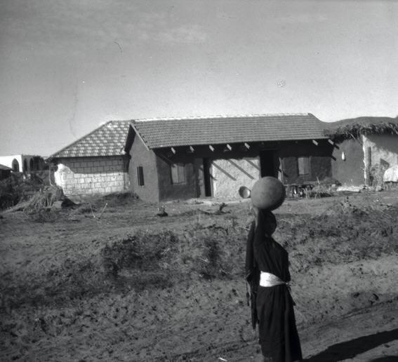 זרנוגה - התקדמות הבנין בכפר הערבי